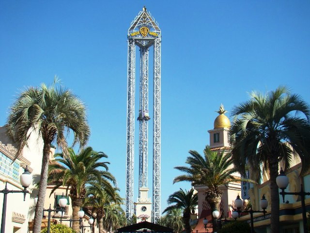 Visión de la torre de caída libre desde la Avenida Principal del Parque Warner de Madrid